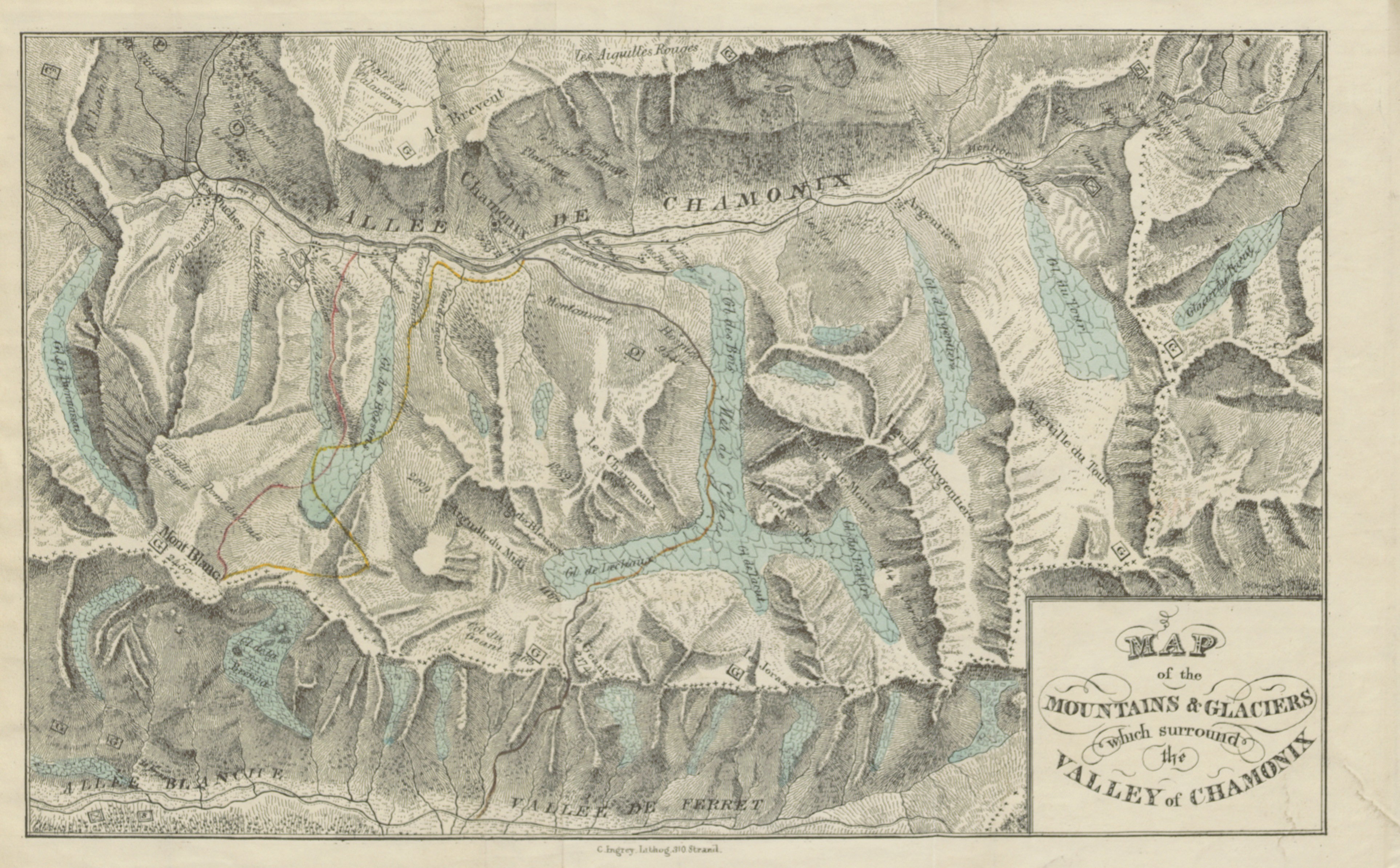 "Map of the mountains and glaciers which surround the valley of Chamonix" publié en 1830 dans "Narrative of an Ascent to the Summit of Mont Blanc, on the 8th and 9th August, 1827" de John Auldjo